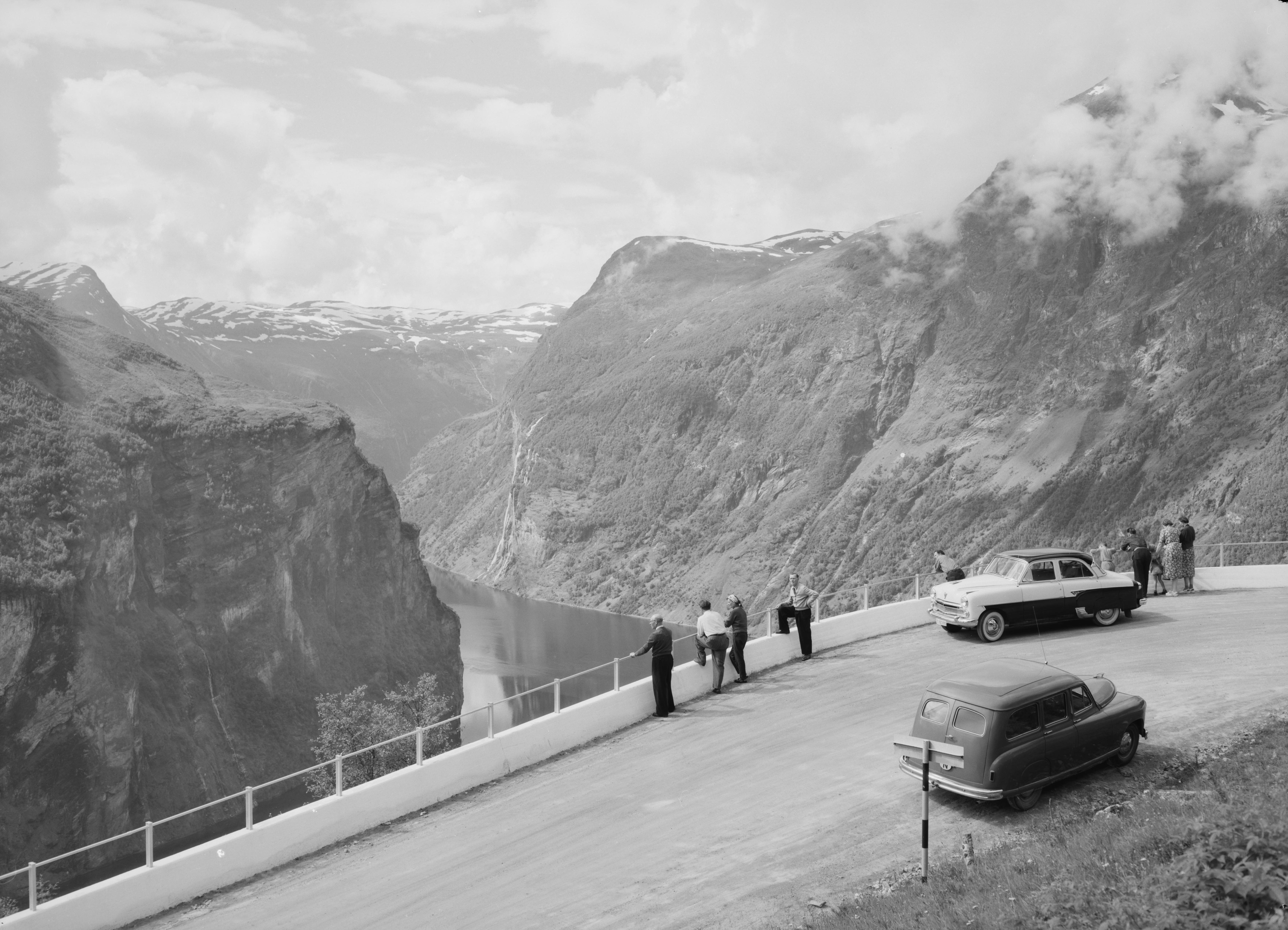 Bildet er hentet fra Nasjonalbibliotekets bildesamling Geirangerfjorden,Ørnesvingen, Stranda, Møre og Romsdal